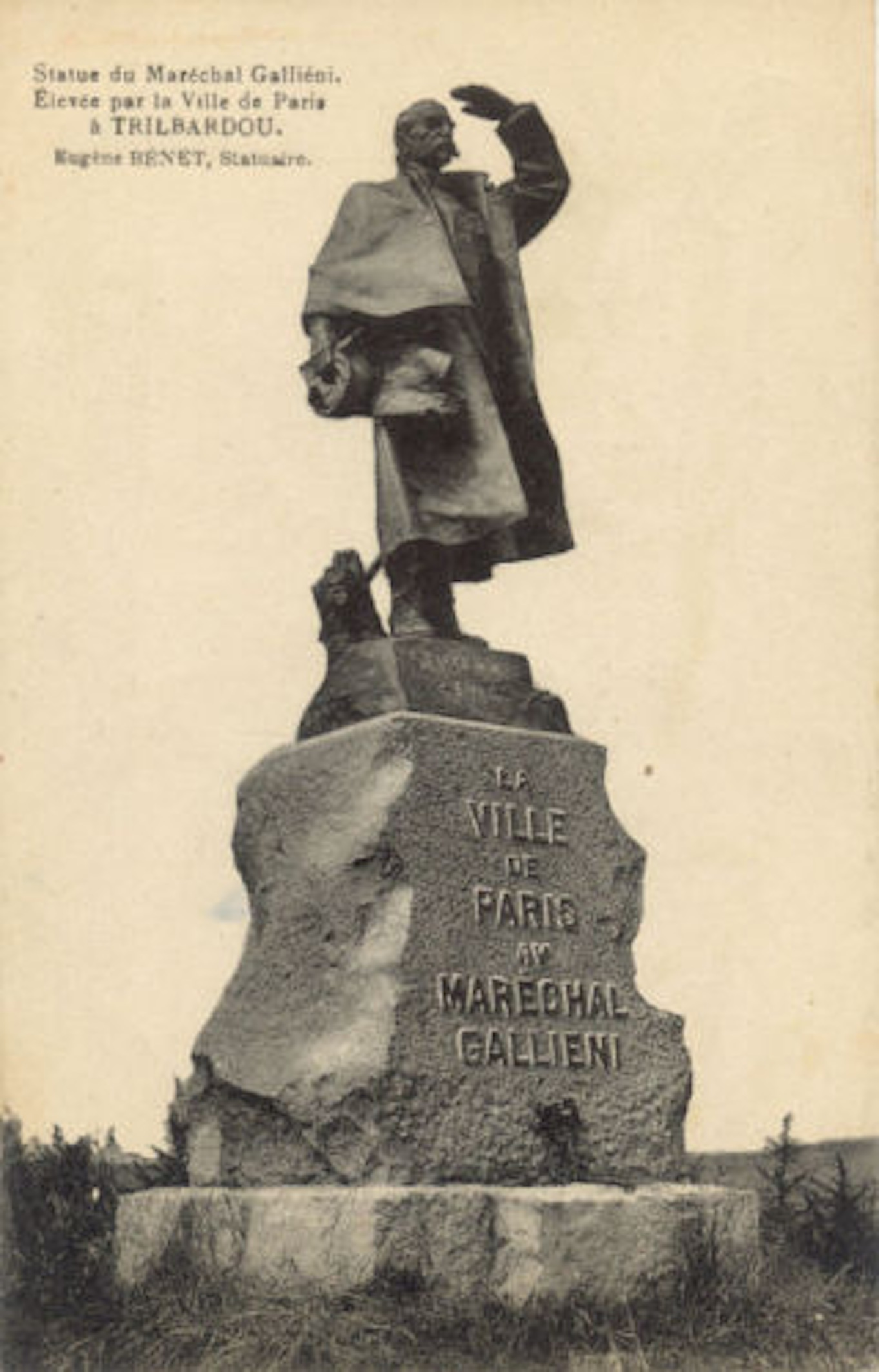 Maréchal Galliéni, Trilbardou, sculpture d'Eugène Bénet